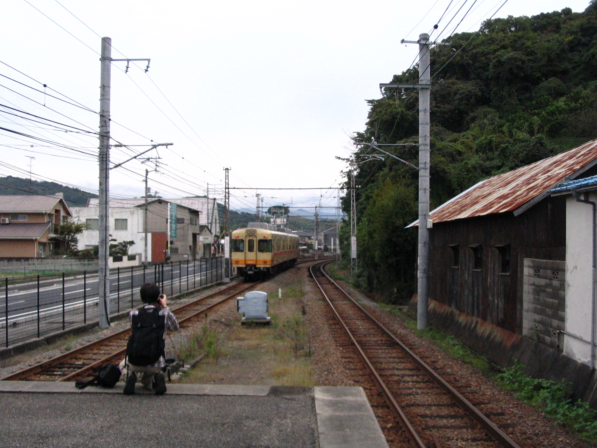 伊予鉄道高浜線港山駅